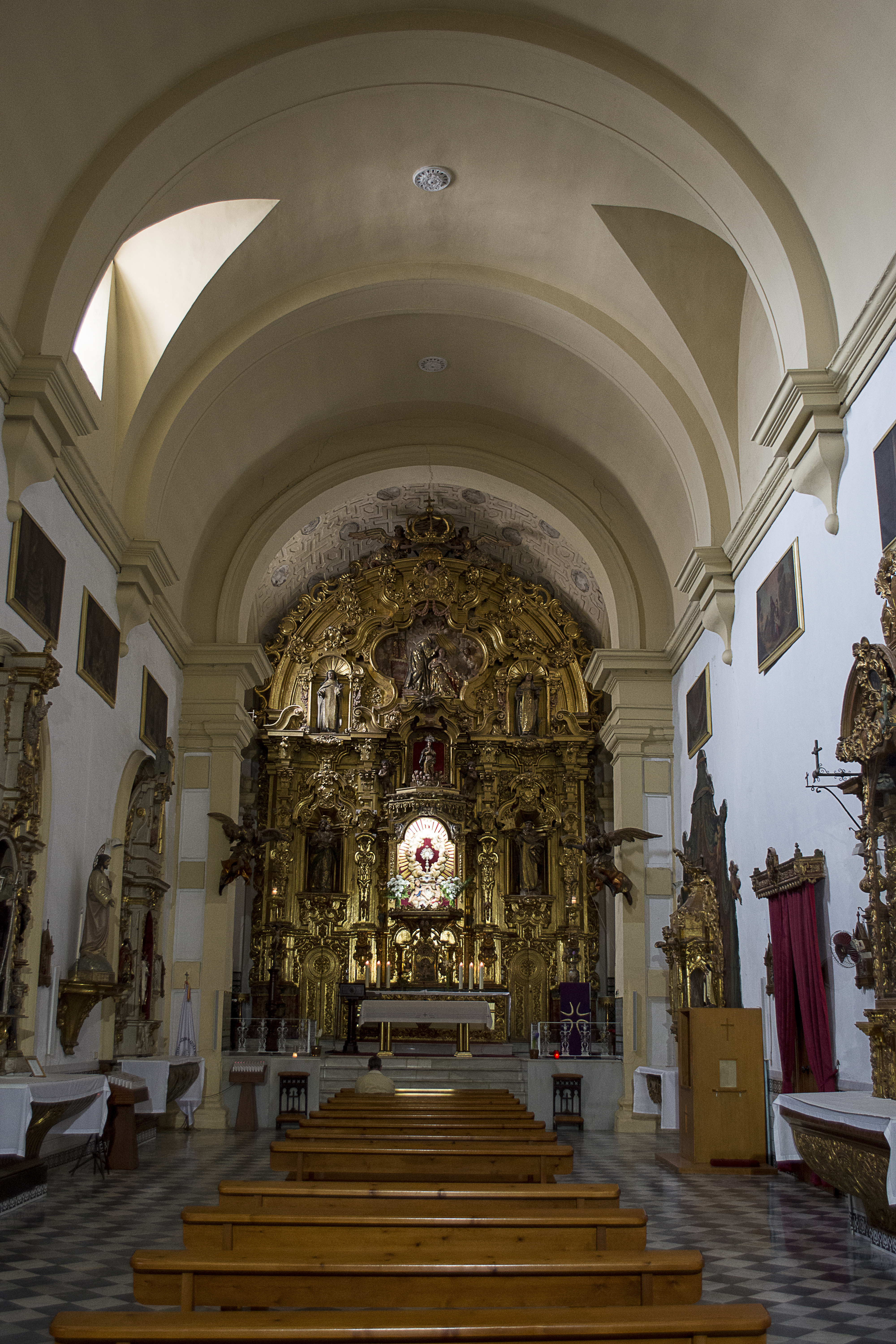 Interior de la iglesia del convento de Regina Coeli en Sanlúcar de Barrameda.